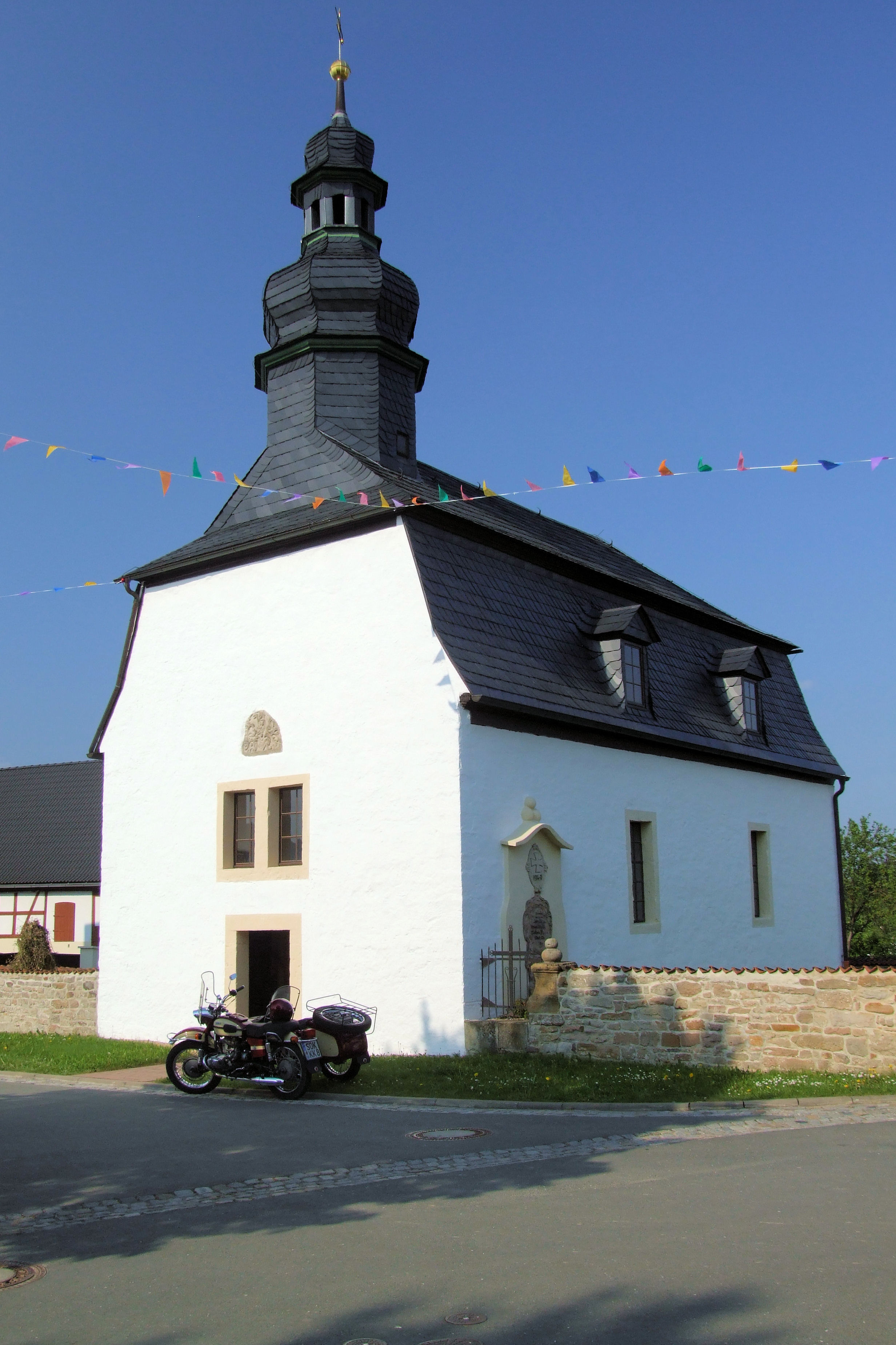 Kirche Lausnitz bei Pößneck, Gemeinde Untwerwellenborn